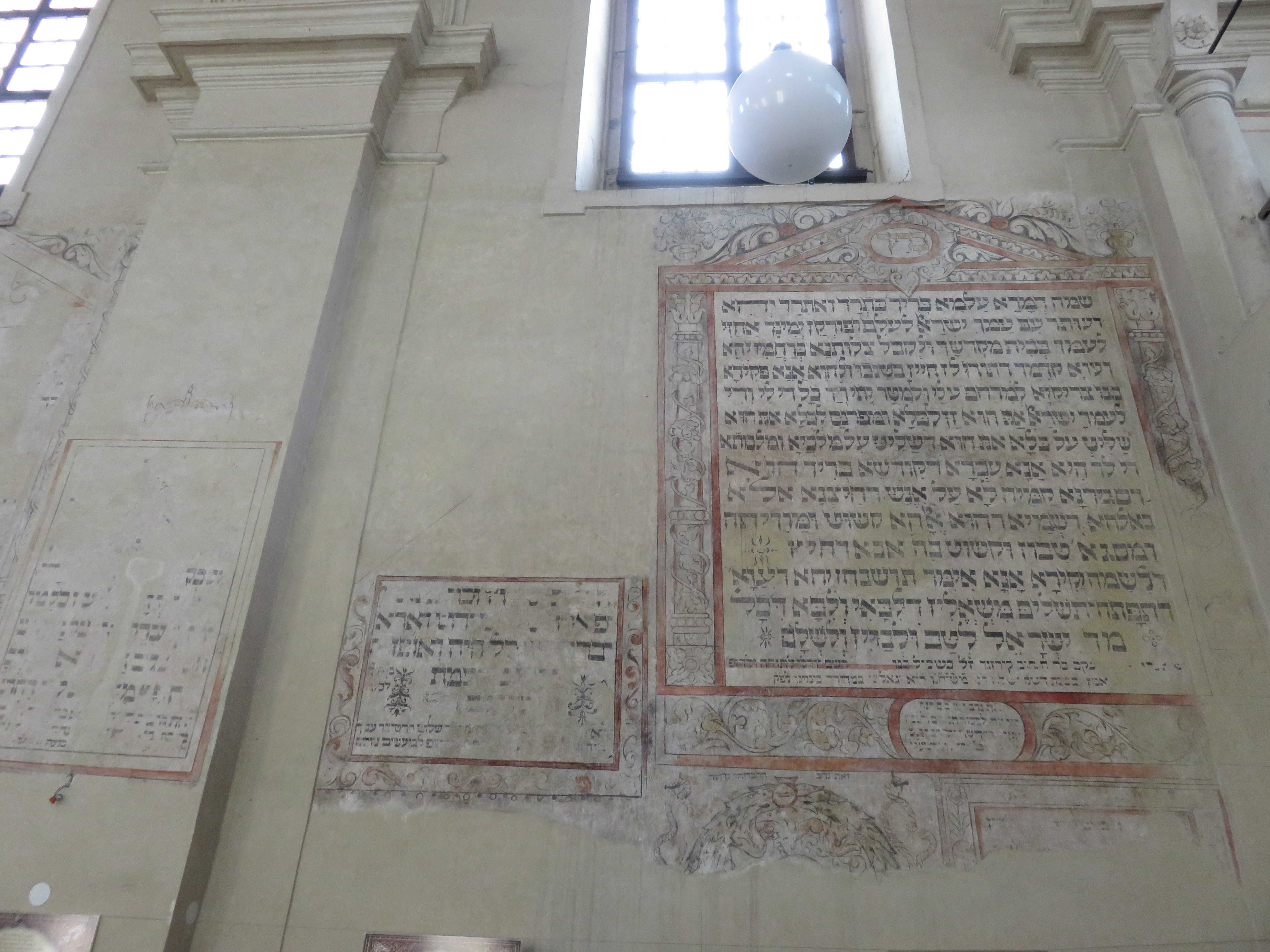 ציורי טיח על קירות בית הכנסת אייזיק שול. קרקוב (5).jpg